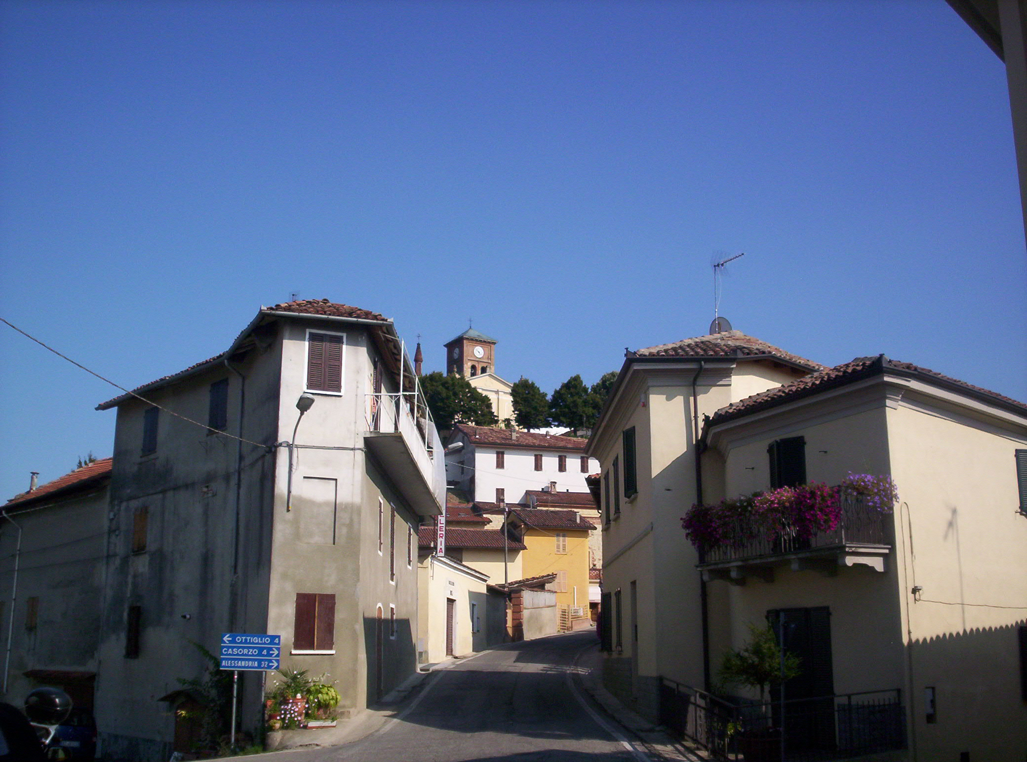 Grazzano Badoglio (Asti), Italy